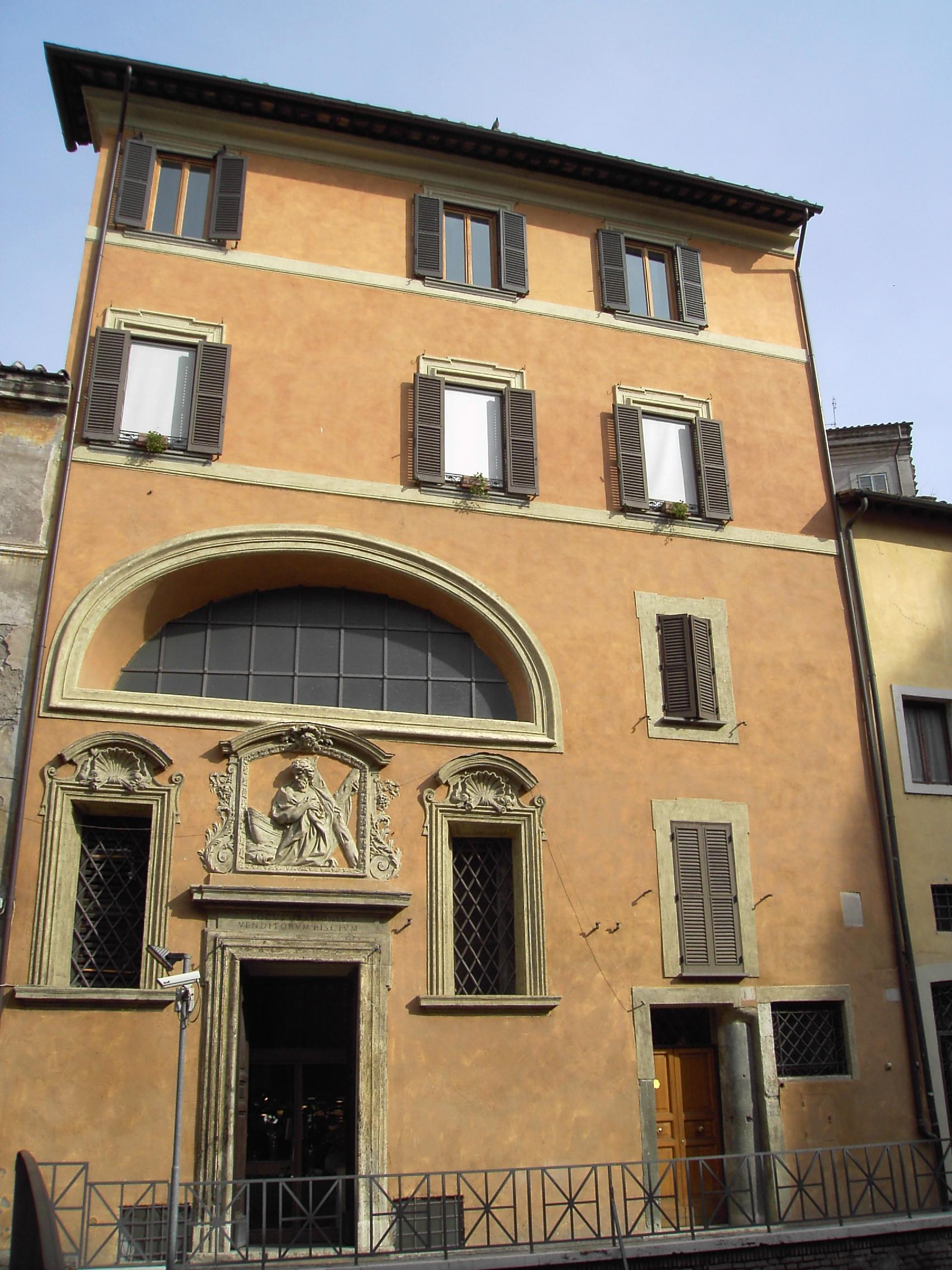 Roma, Oratorio di San'Andrea dei pescivendoli a Sant'Angelo in Pescheria